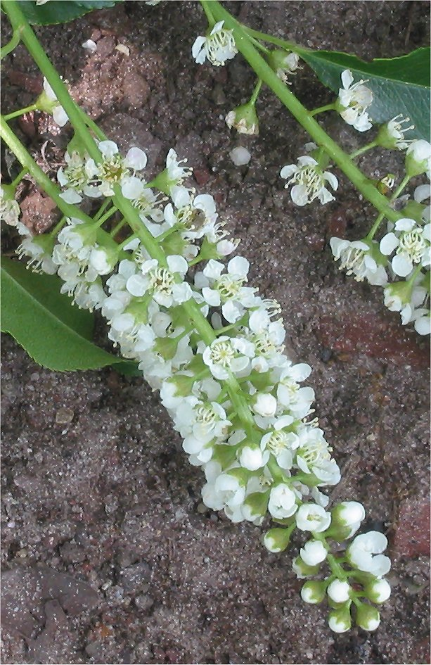 (Amerikaanse vogelkers) Prunus serotina